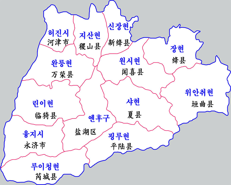 윈청시 현급구역도